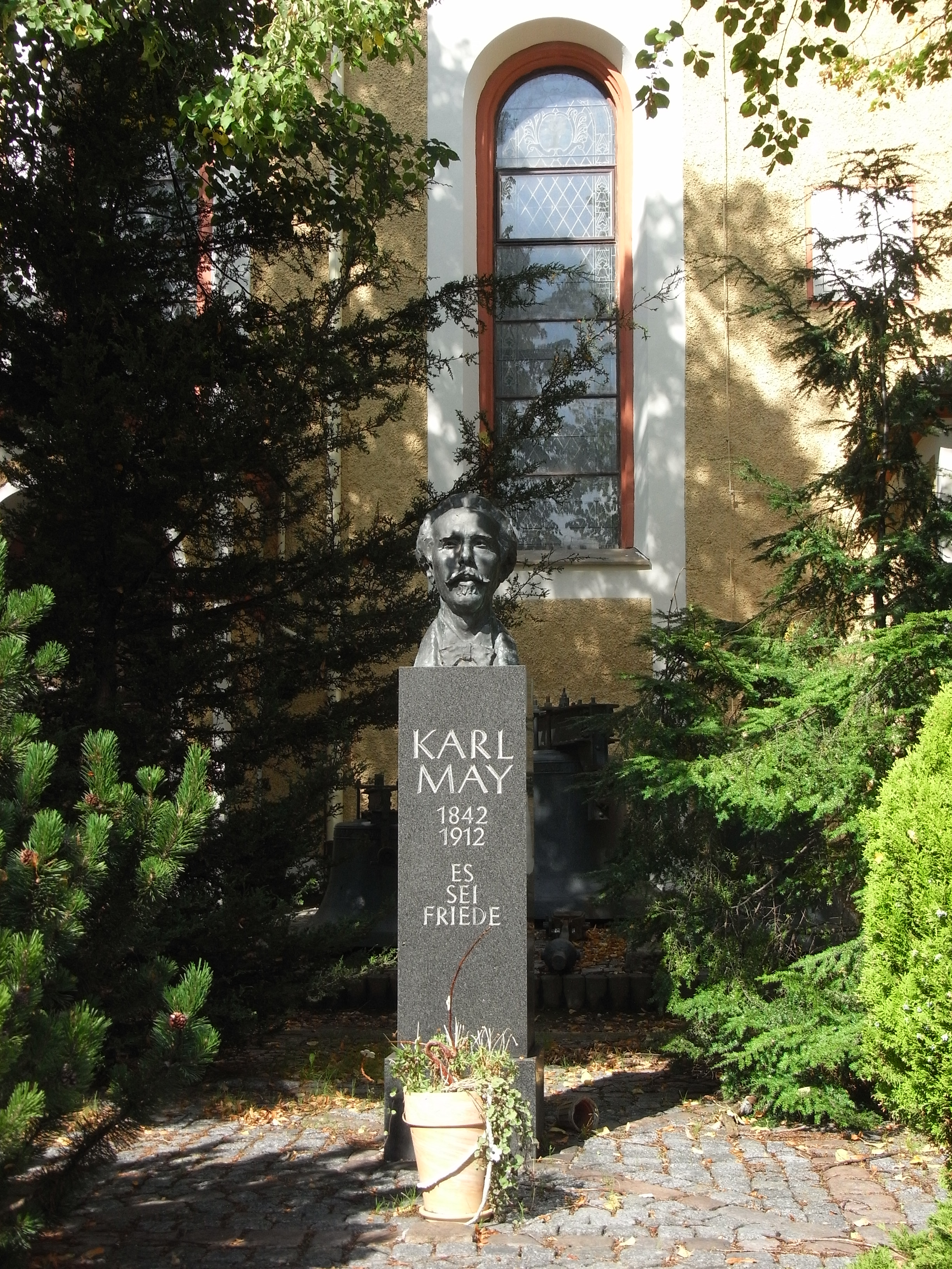 Hohenstein-Ernstthal, Neumarkt, Karl May Gartendenkmal der Stadtkirche St. Trinitatis.